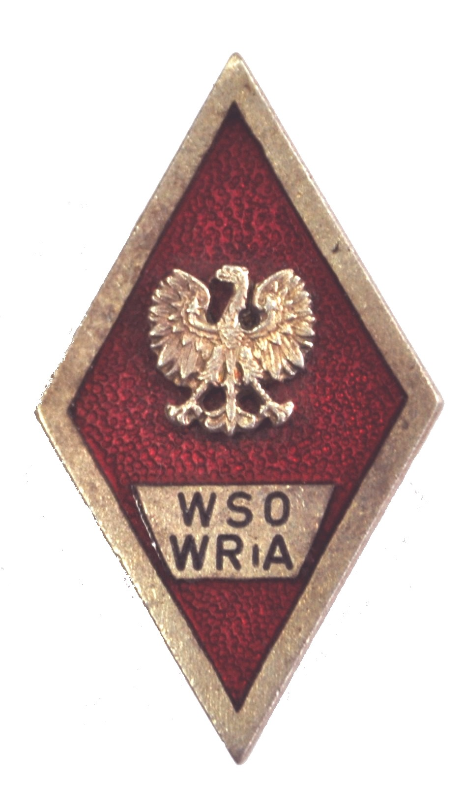 Absolventenabzeichen Offziershochschule der Raketentruppen und Artillerie.